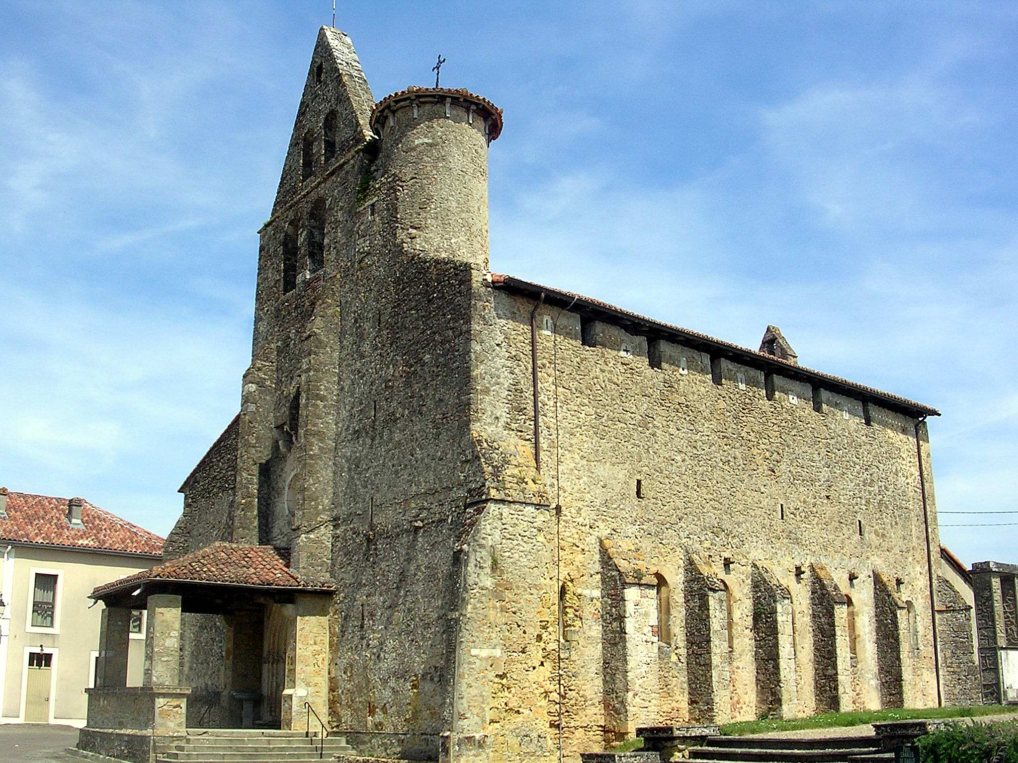 Eglise saint-Amand de Bascons, dans le département français des Landes